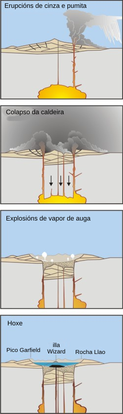 Fases da formación da caldera volcánica do Monte Mazama